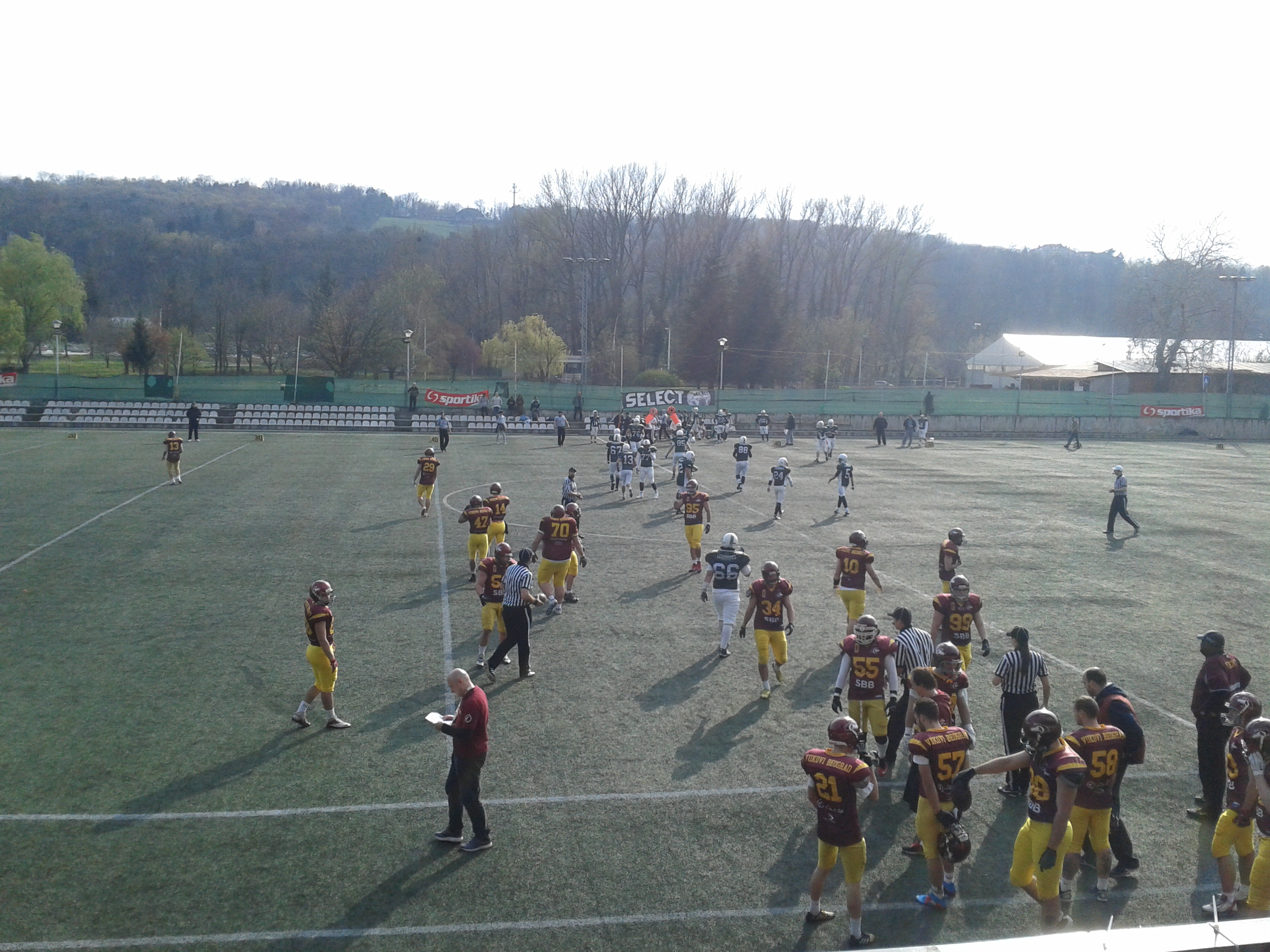 Српски (ћирилица): Вукови - Легионари (ПЛС 2016)